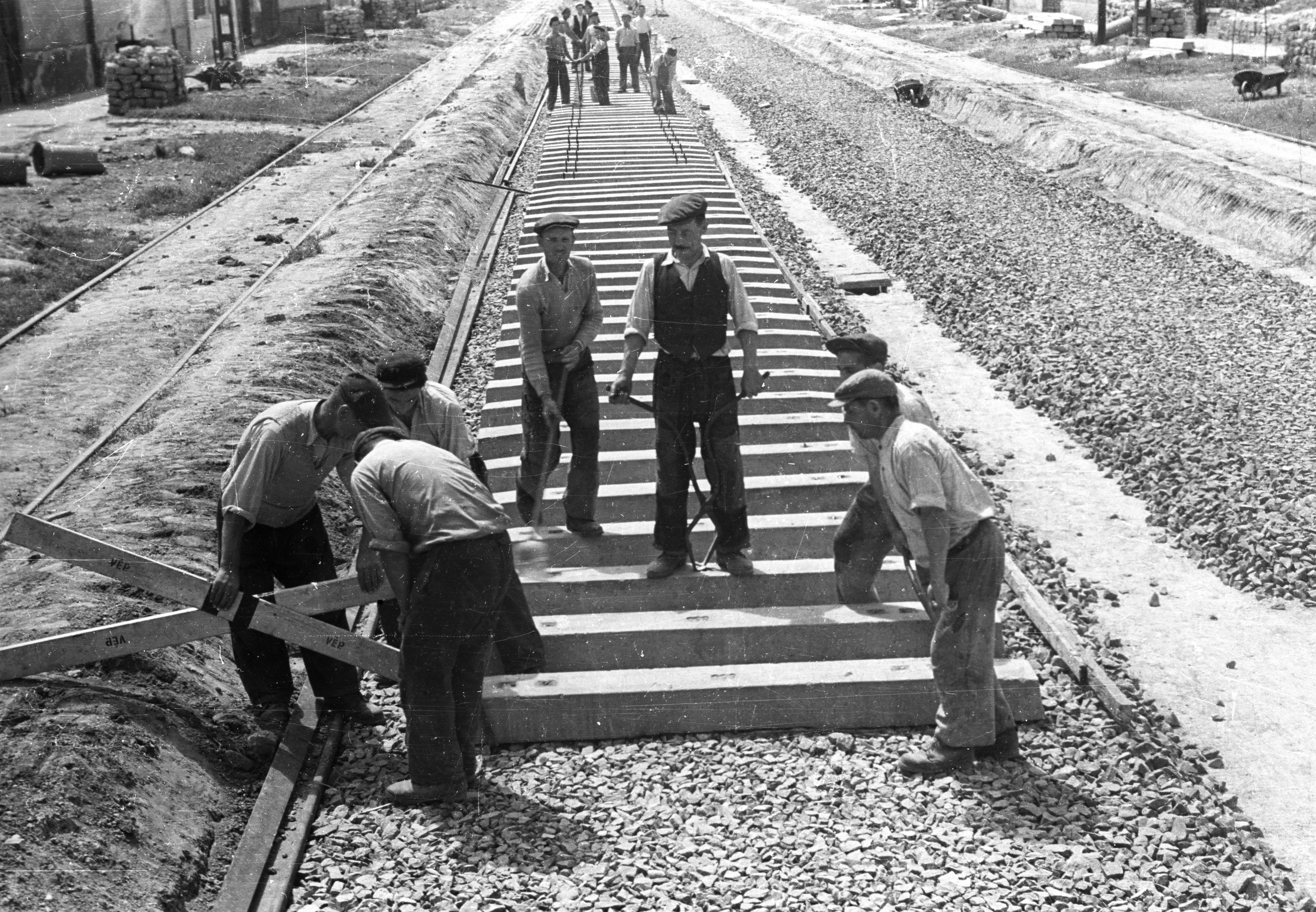 II. Rákóczi Ferenc út, a csepeli gyorsvasút építése. Location: Hungary, Budapest XXI. Tags: Budapest, construction Title: II. Rákóczi Ferenc út, a csepeli gyorsvasút építése.